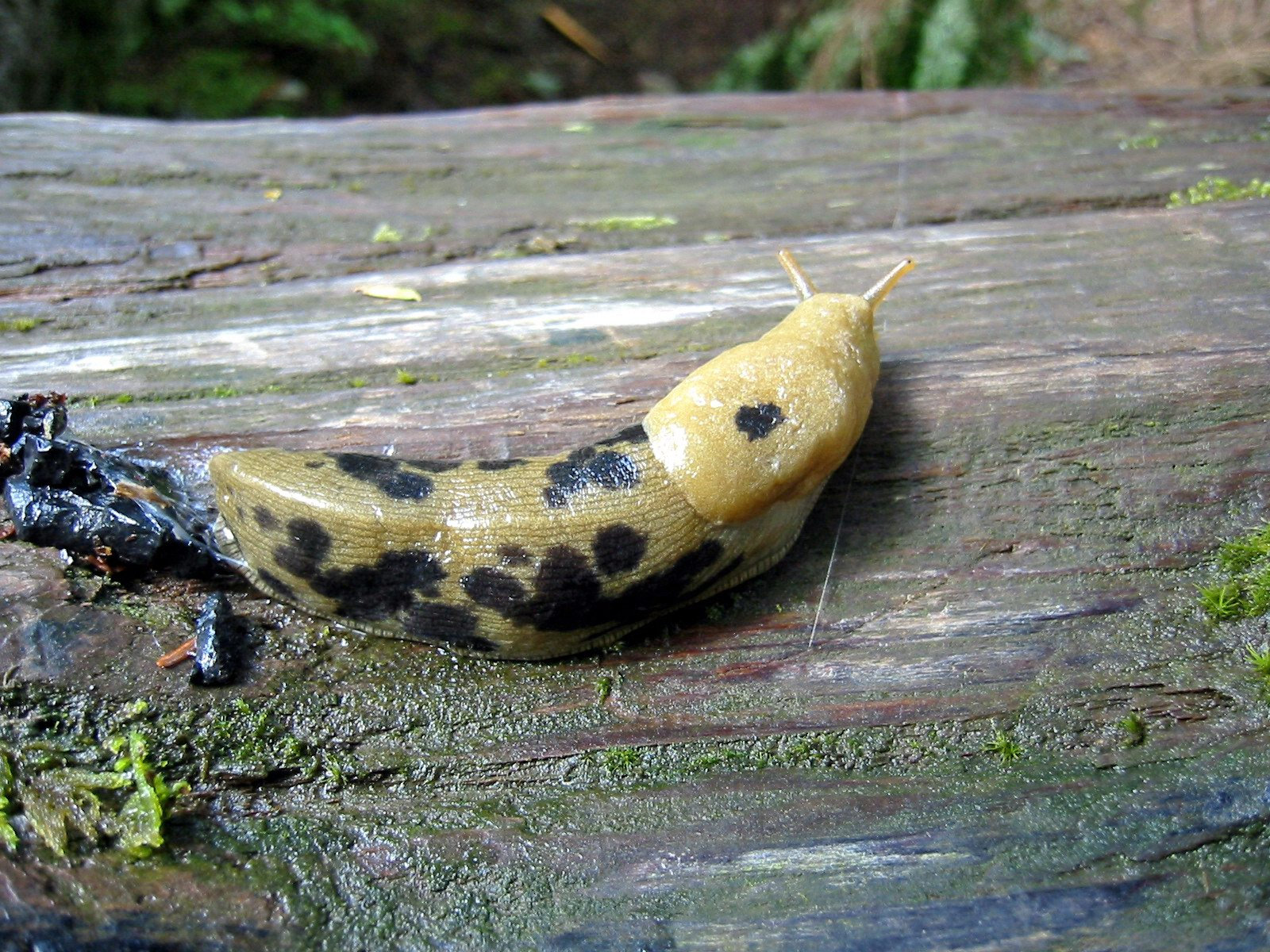 Banana Slug (Ariolimax columbianus), Canada